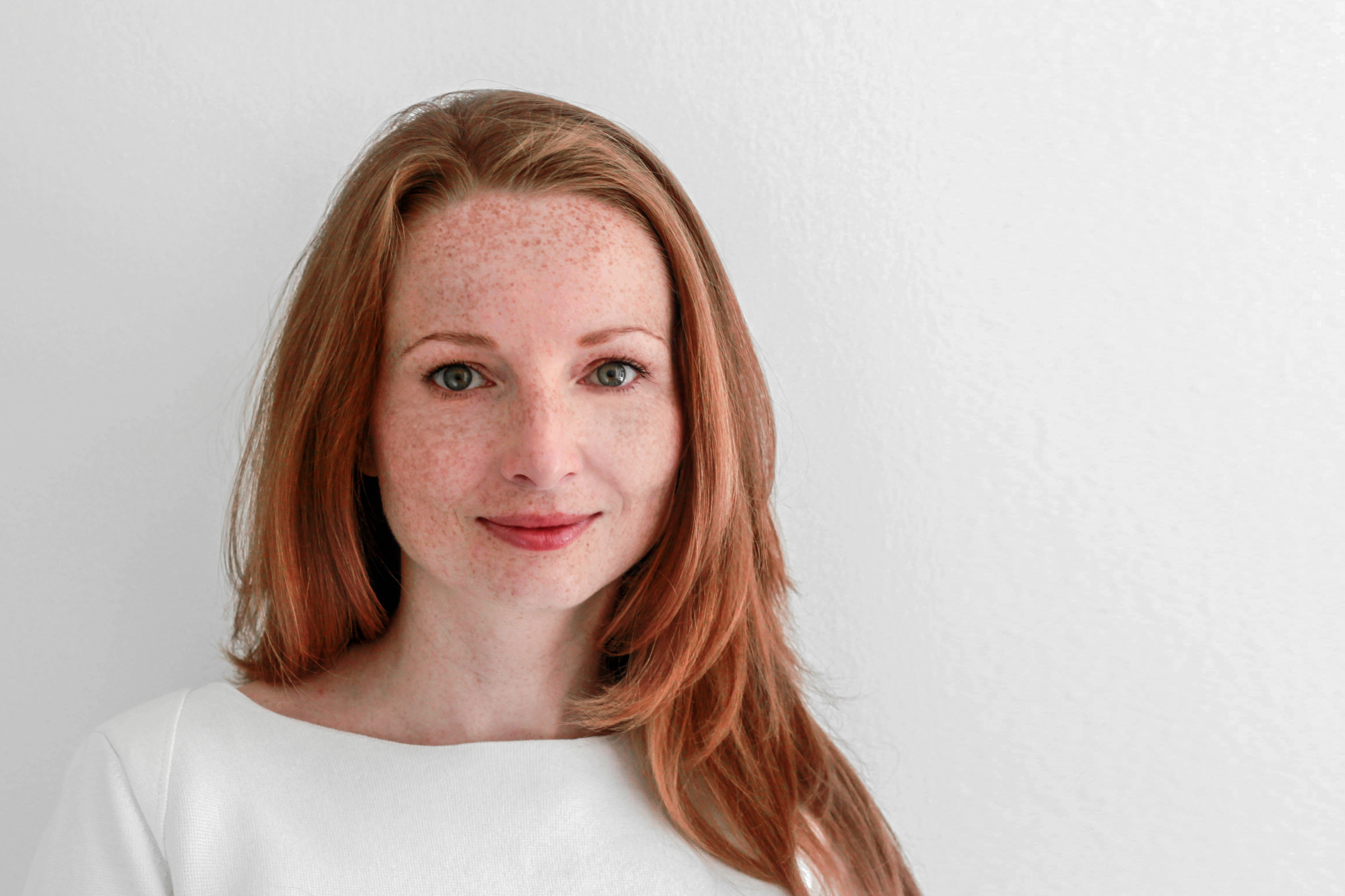 Marta Sękulska-Wrońska